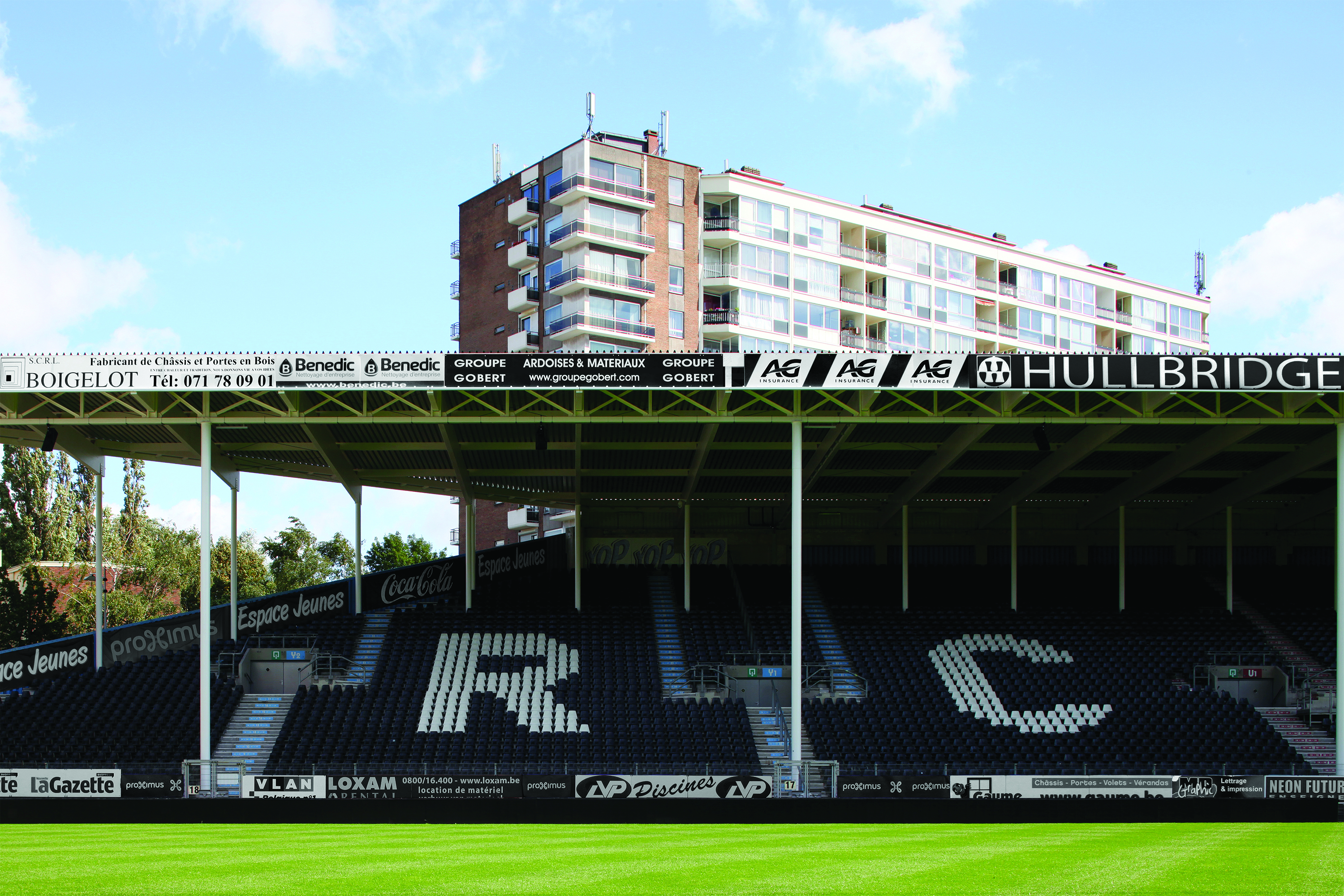 Rénovation du stade du Pays de Charleroi